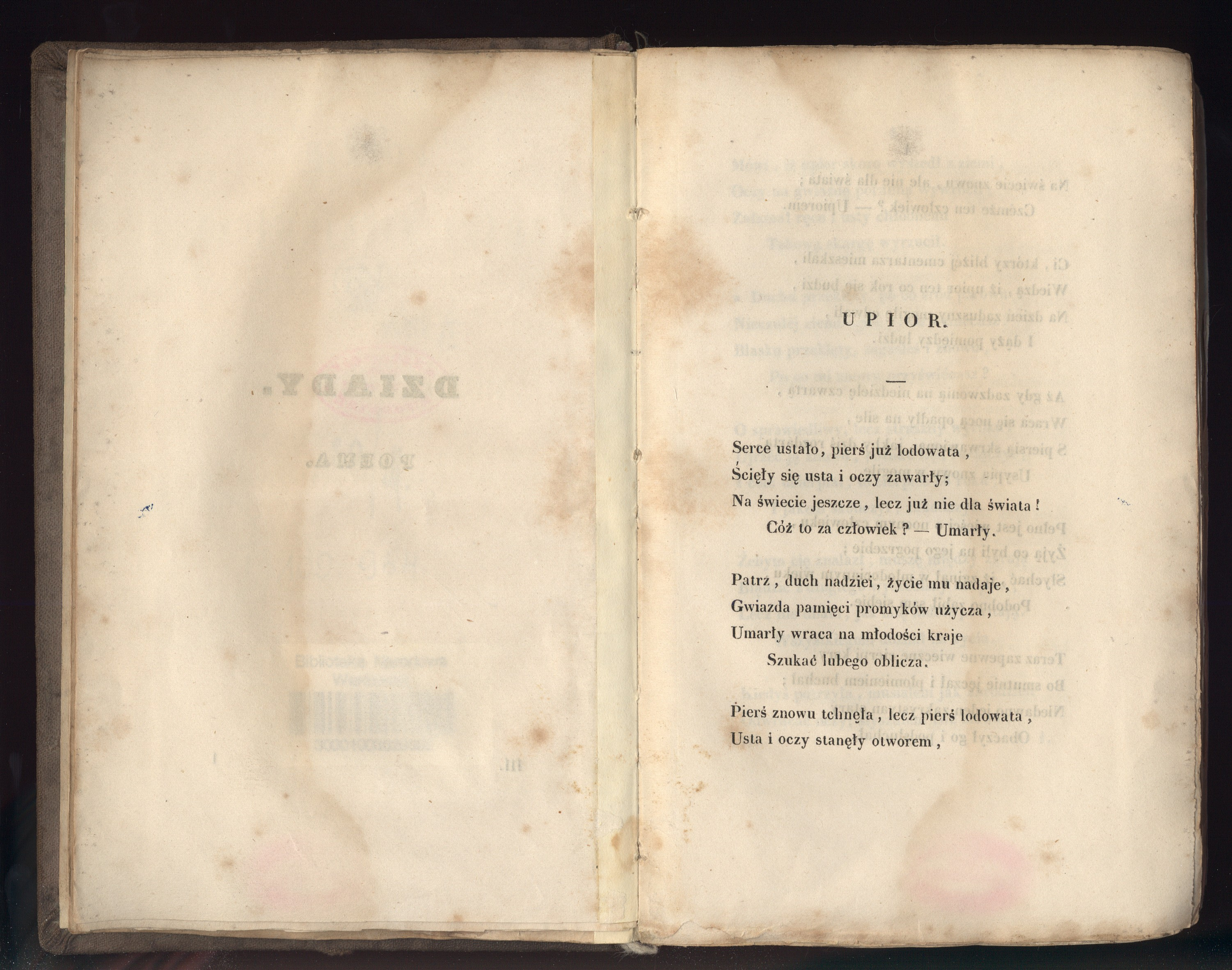 3 początkowe zwrotki utworu "Upiór" autorstwa Adama Mickiewicza, wydanie z 1829 roku